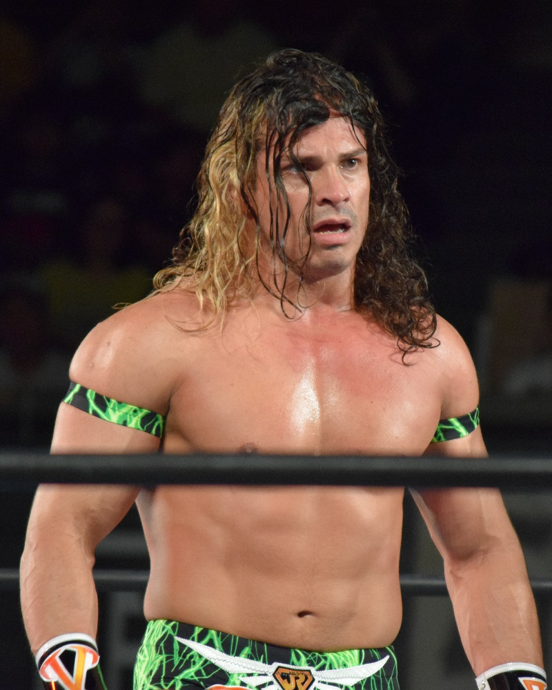 2016年5月29日 大阪市中央体育館・サブアリーナ 「BEST OF THE SUPER Jr.XXIII」 ボラドール・ジュニア